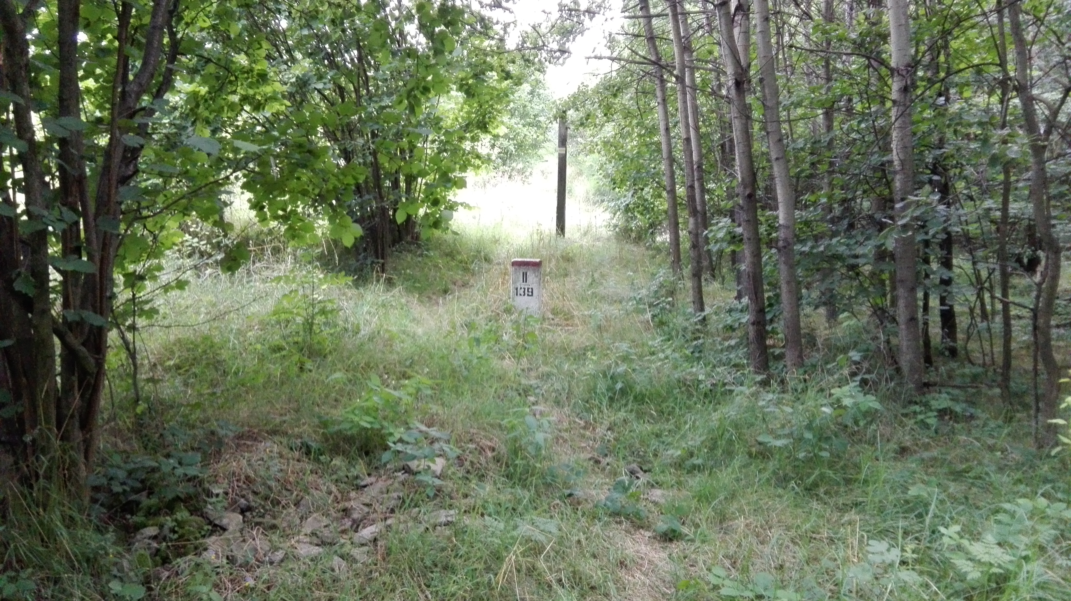 Granica polsko-czeska, znak graniczny nr II/139